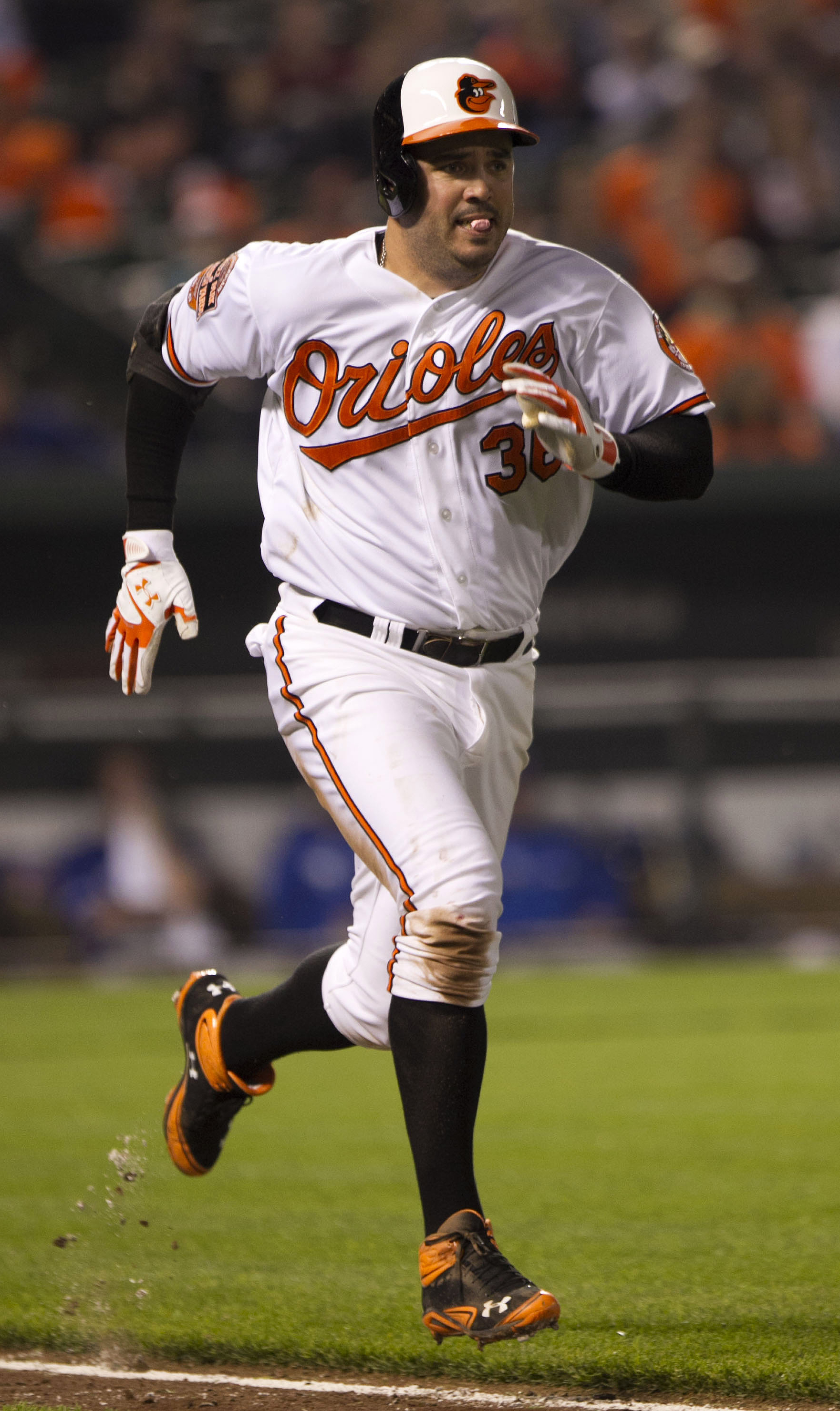 Nick Johnson